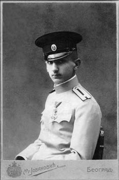 Престолонаследник Ђорђе Карађорђевић, црнобела фотографија, 1904. године у Београду